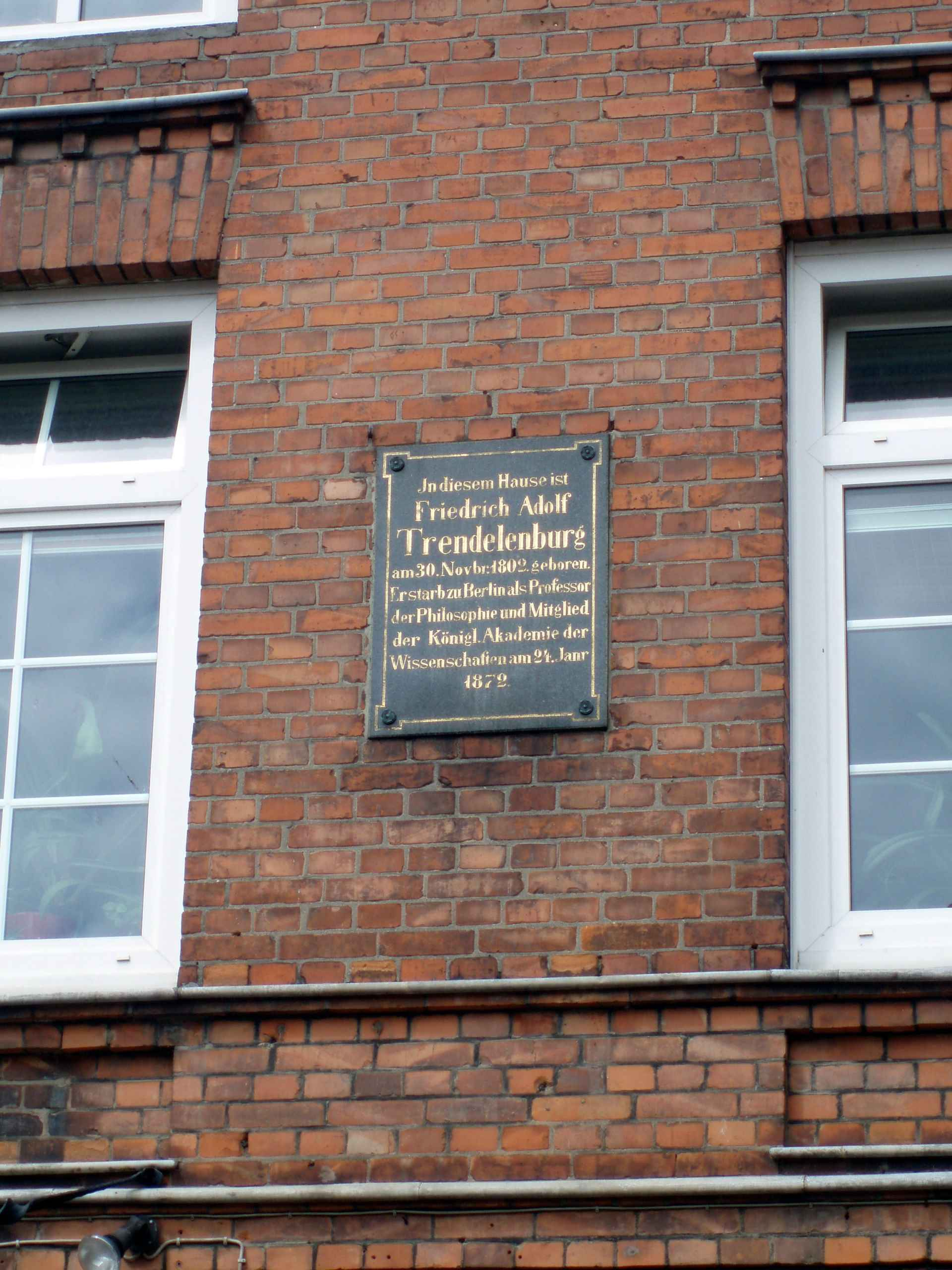 Trendelenburg-Tafel in Eutin